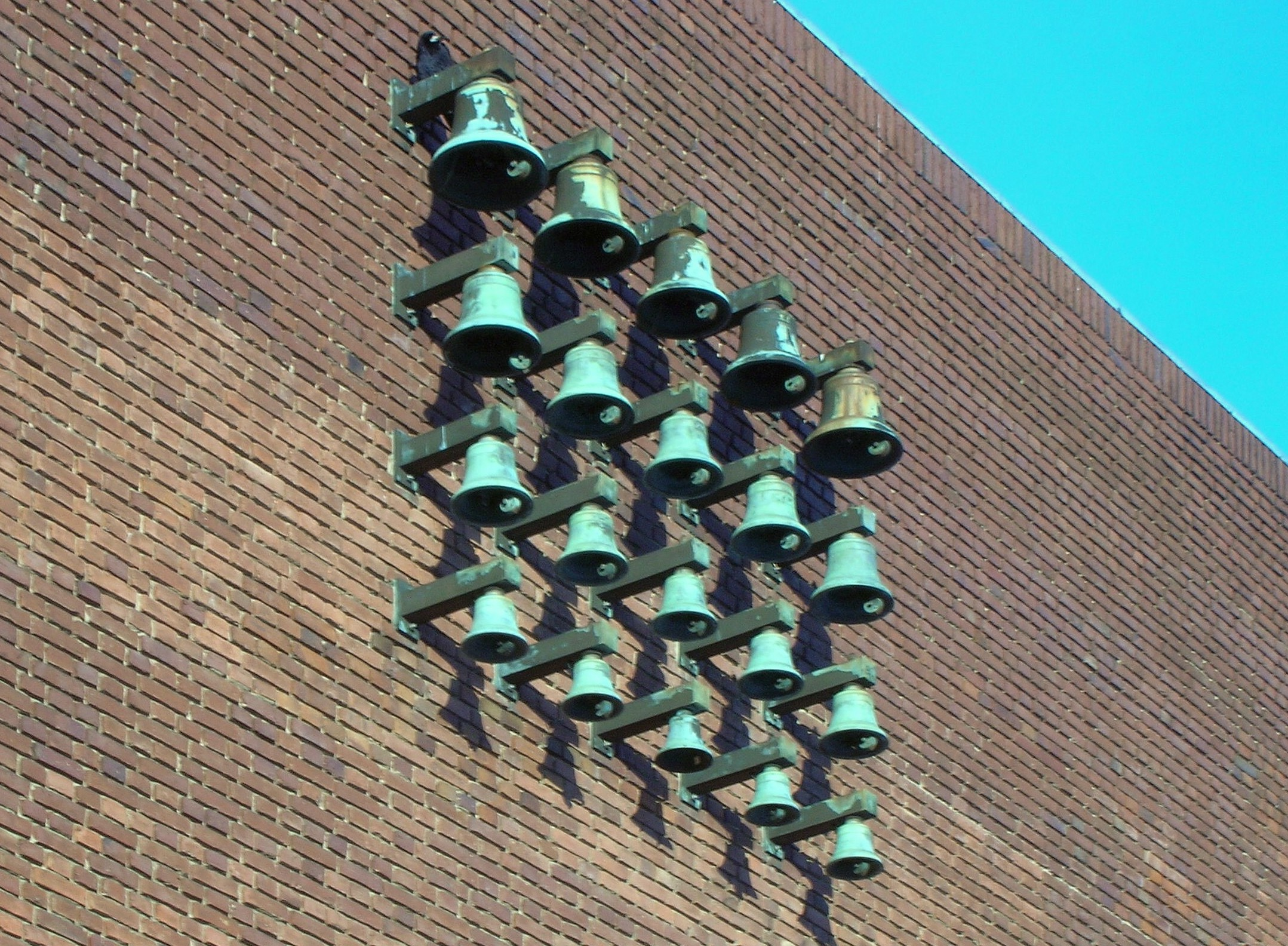 Bells on Helgeandskyrkan in Lund, Sweden.